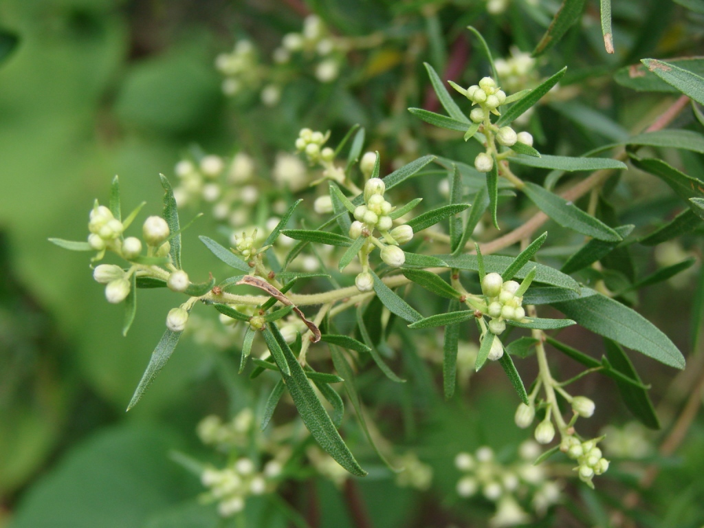 Baccharis dracunculifolia - ASTERACEAE - Parque Olhos D'Água - Brasília - Distrito Federal - Brasil.